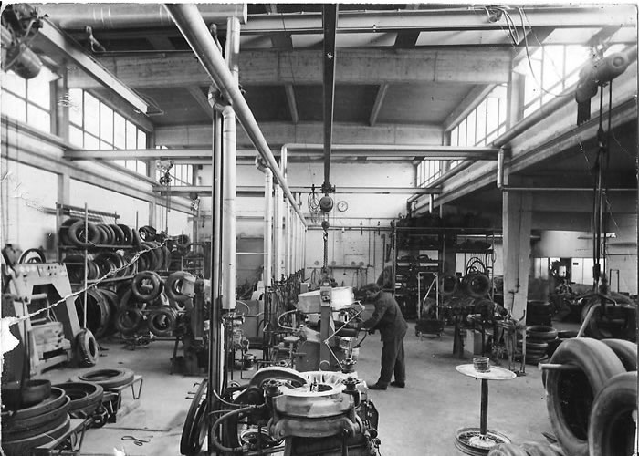 Rundernuerung Produktion